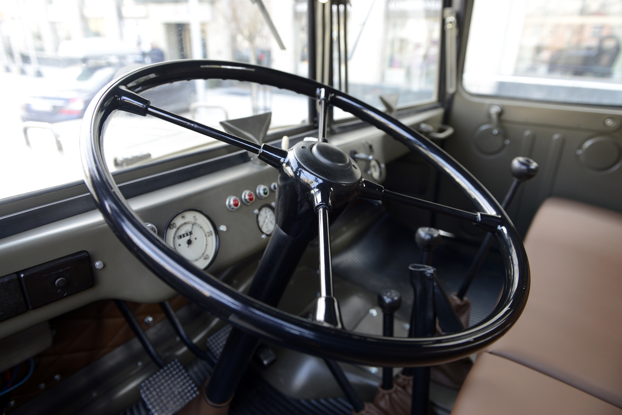 Tatra 128 (interior)